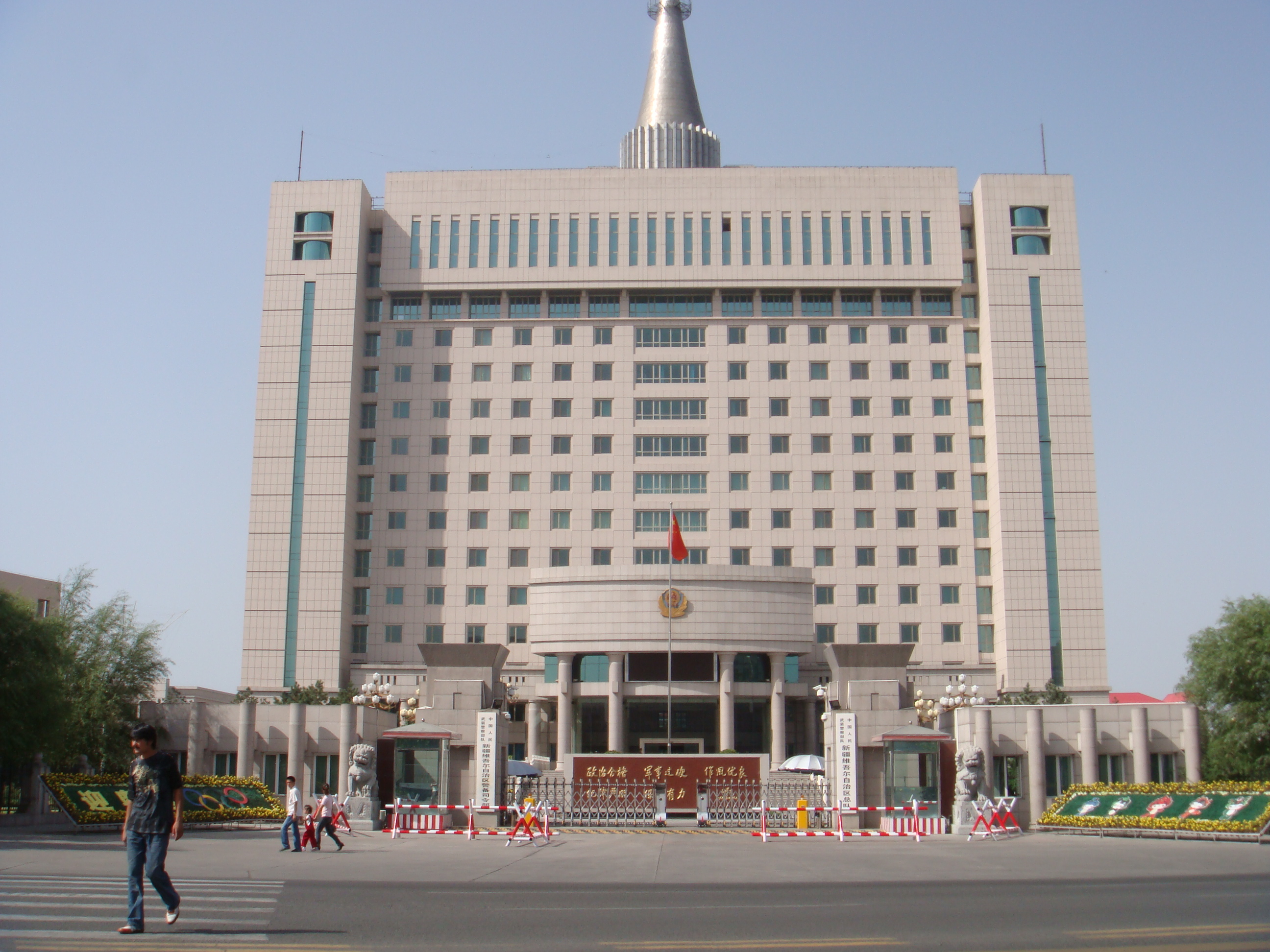 中国新疆乌鲁木齐市 China Xinjiang Urumqi, China Xinjiang Urumqi Welcome you to tour the, Китай Синьцзяна Урумчи приветствовать Вас на экскурсию, الصين ترحب زيارتك لاورومتشى فى شينجيانغ, 中国新疆のウルムチへの訪問を歓迎する, 中国新疆乌鲁木齐欢迎您来观光旅游